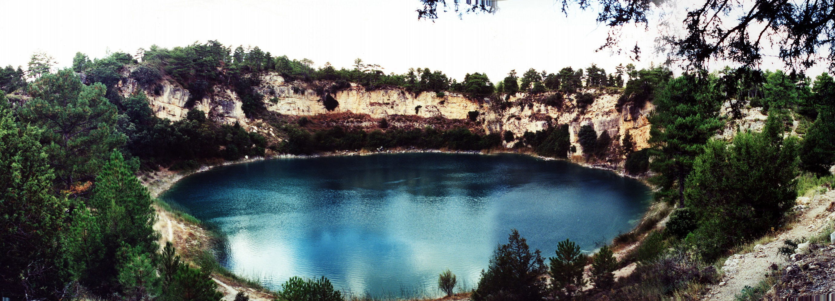 Laguna Parra, Lagunas de Cañada del Hoyo, en la Provincia de Cuenca (España). Las Lagunas de Cañada del Hoyo son un complejo lagunar de España de tipo cárstico.